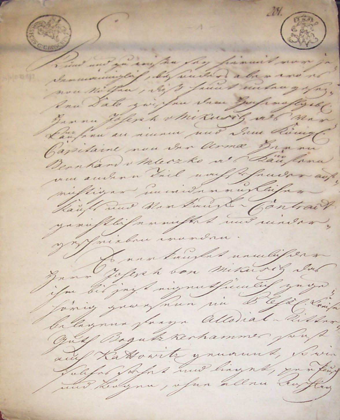 Umowa kupna-sprzedaży wsi Kattowitz (Katowice) zawarta 18 września 1796 między Josephem Mikush oraz Bernhardem Mleczko. Odpis z roku 1797.